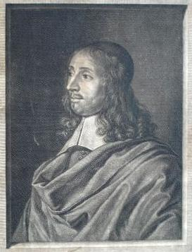 Portrait of Antoine le Maistre (1608–1658)